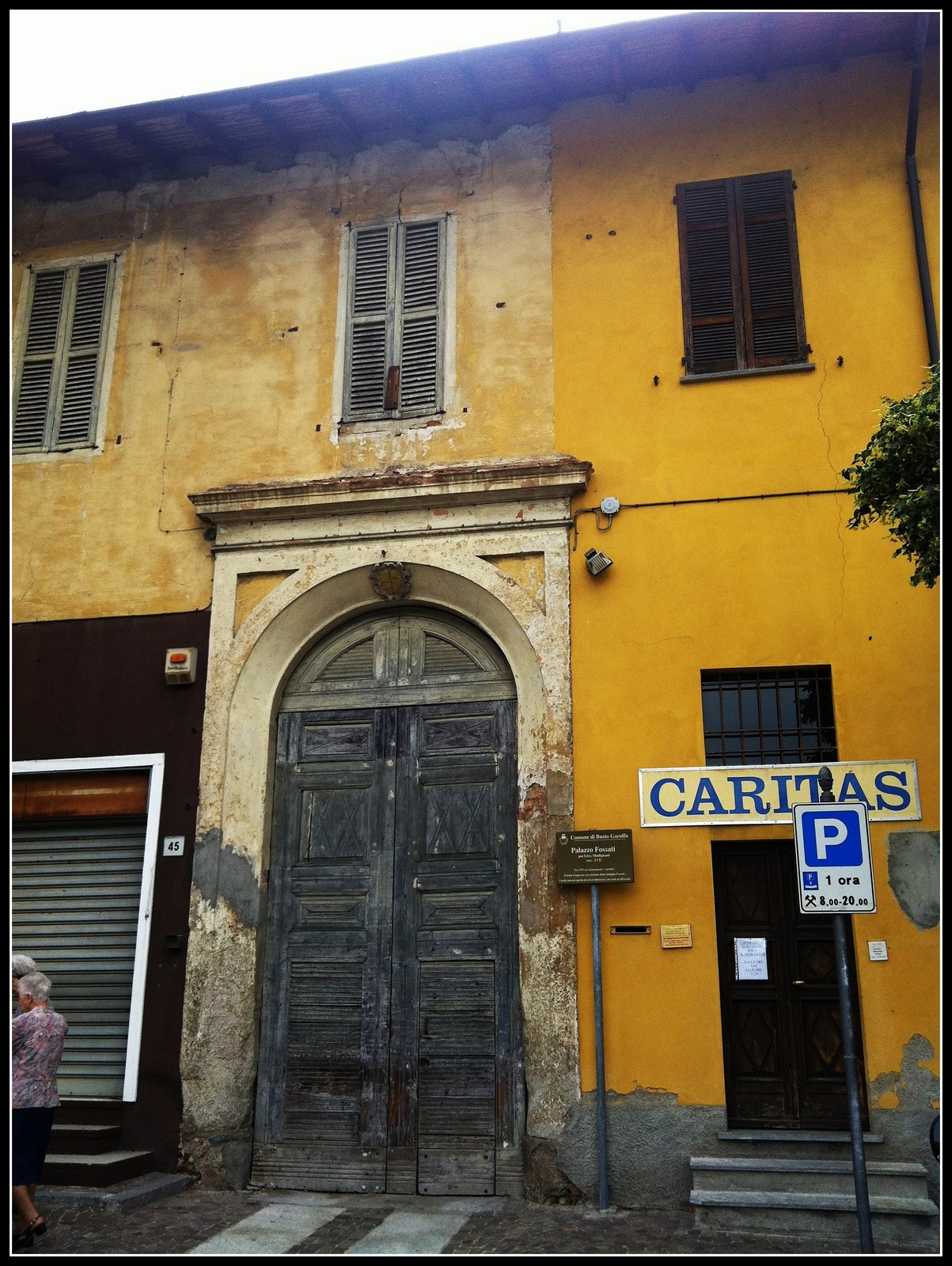 Busto Grarolfo - Palazzo Fossati